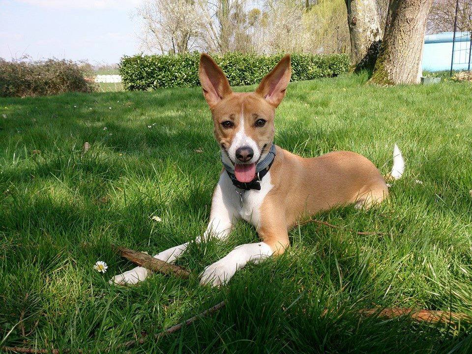 Laobé de 2 ans